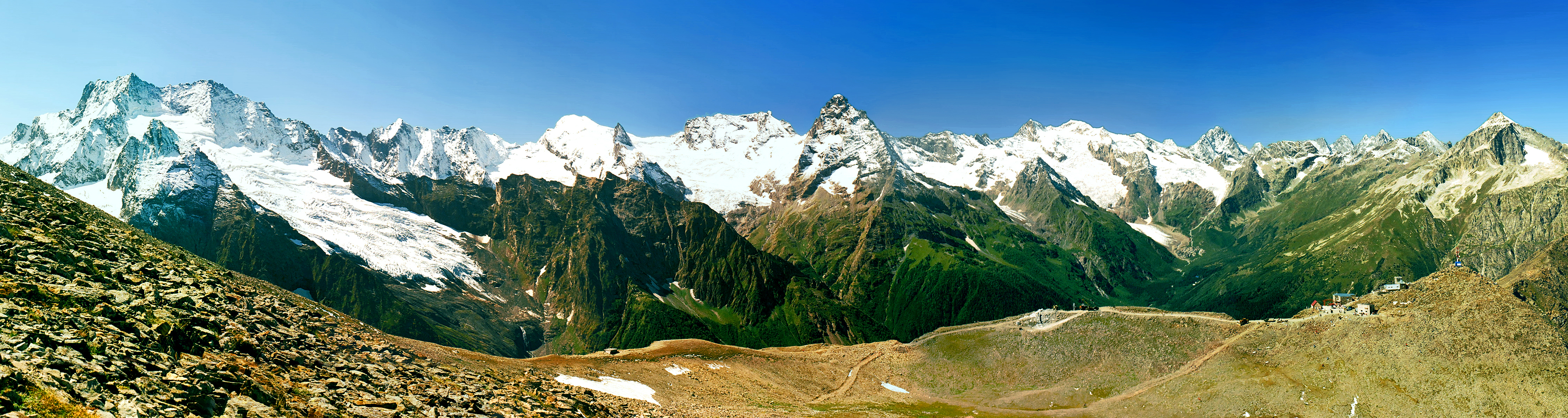 Главный Кавказский хребет. Канатная дорога, Домбай. Сентябрь 2006.